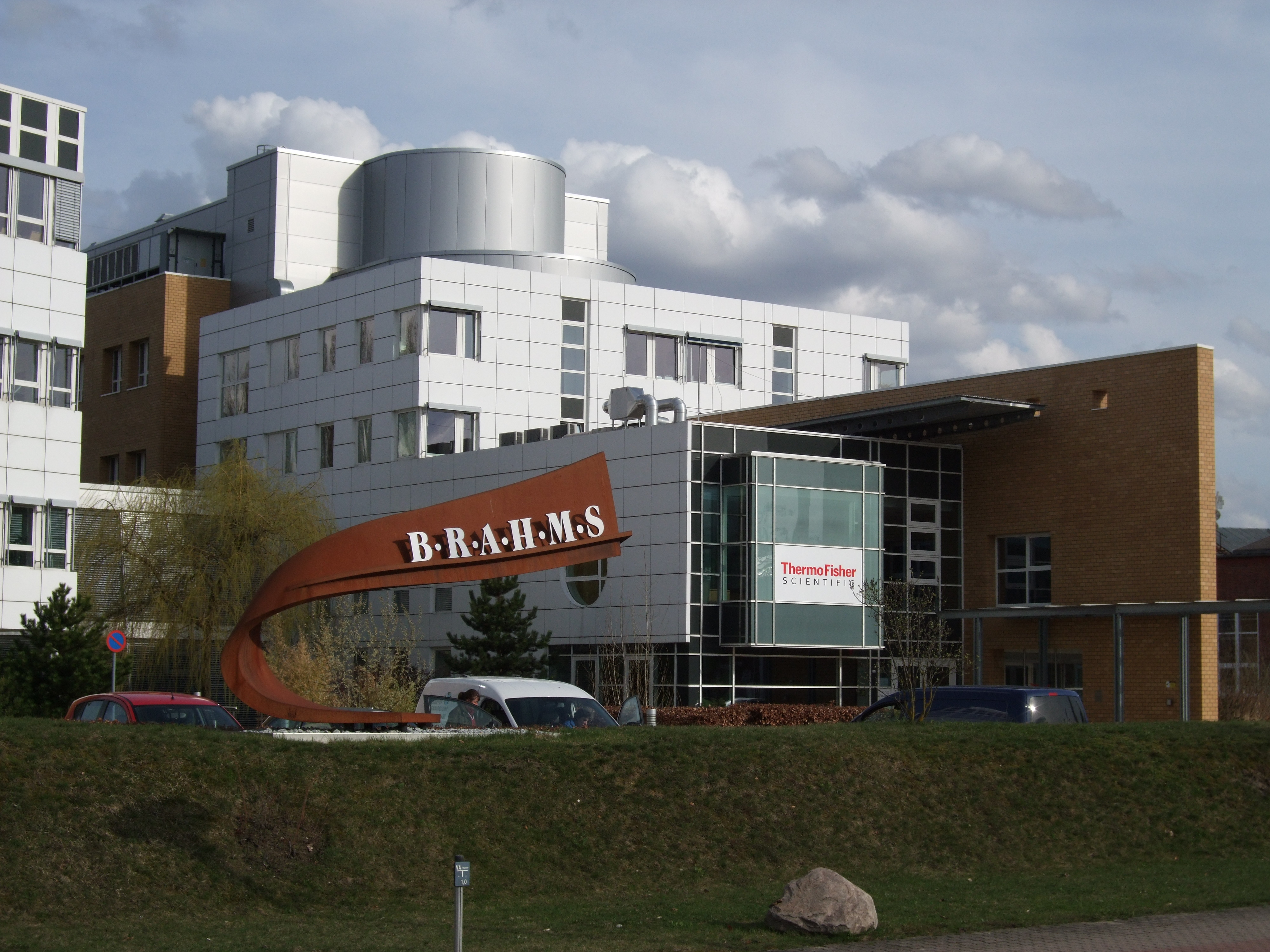 Das Hauptgebäude von Thermo Fisher, ehemals Brahms AG in Hennigsdorf